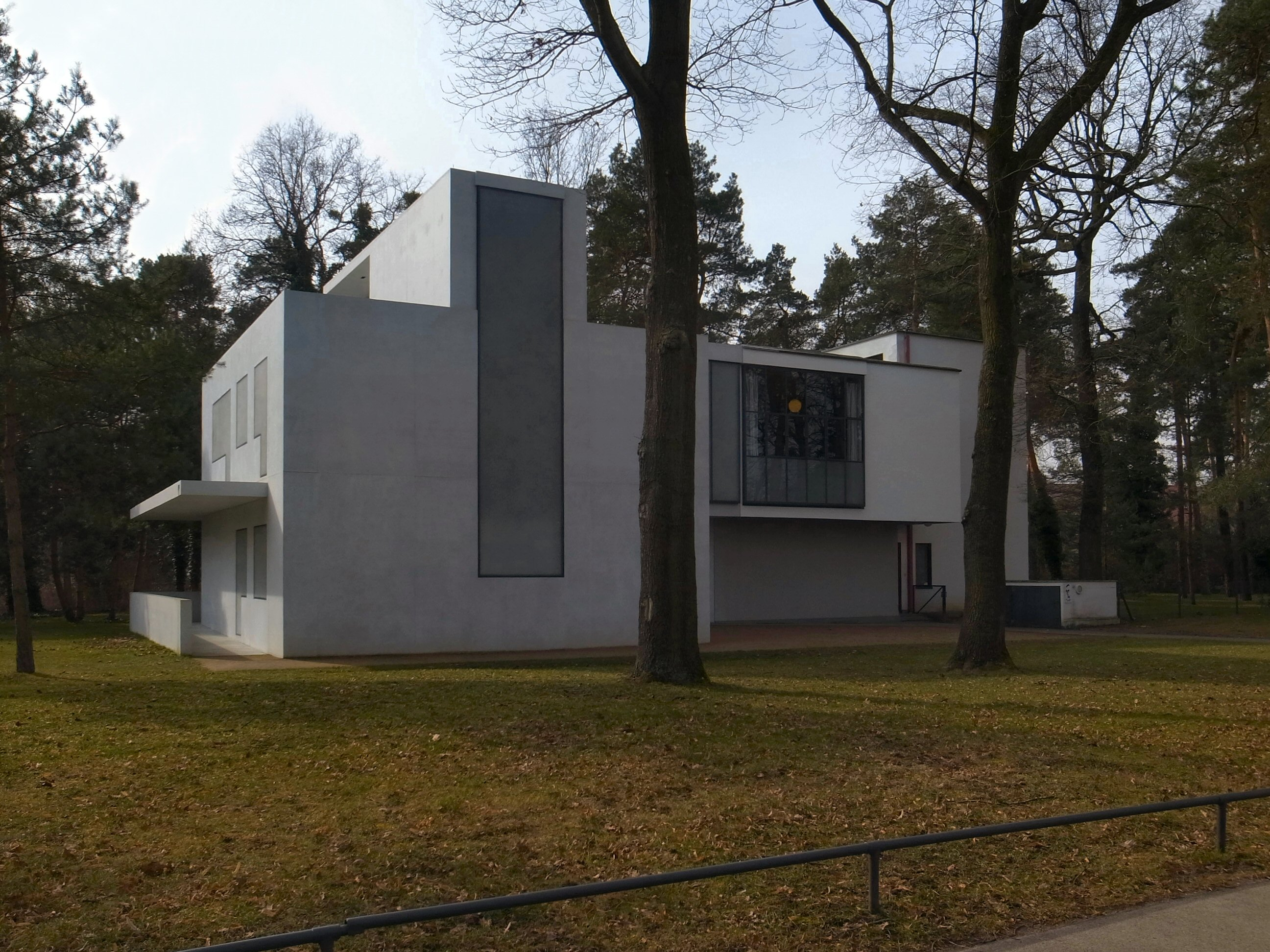 Dessau Meisterhaussiedlung. Haus Moholy-Nagy/Feininger. (Links das 2012-2014 rekonstruiertes Meisterhaus Moholy-Nagy)